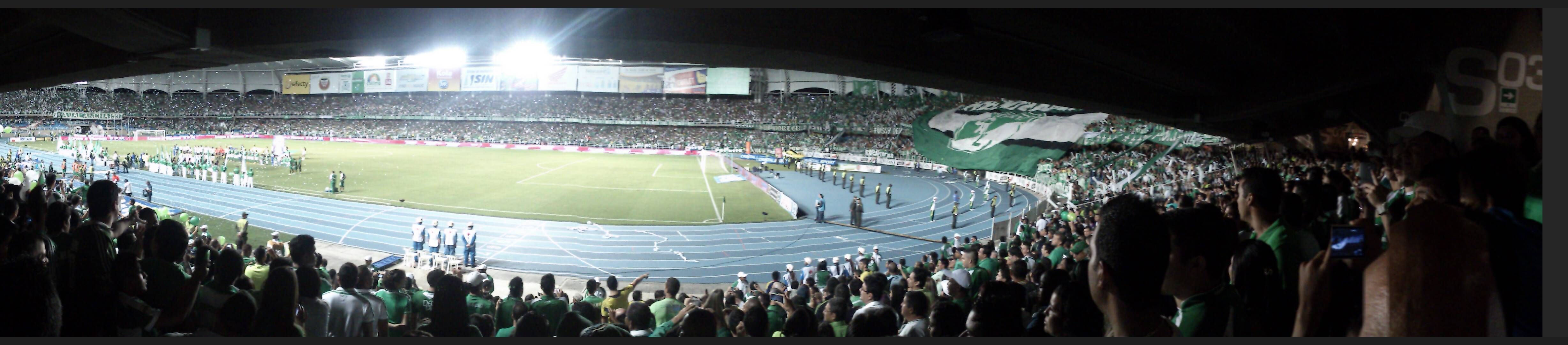 4 fecha de los cuadrangulares finales que enfrento al Deportivo Cali y once caldas, donde el primero venció al segundo 1-0 y se clasificó con dos fechas de anticipación a la gran final.